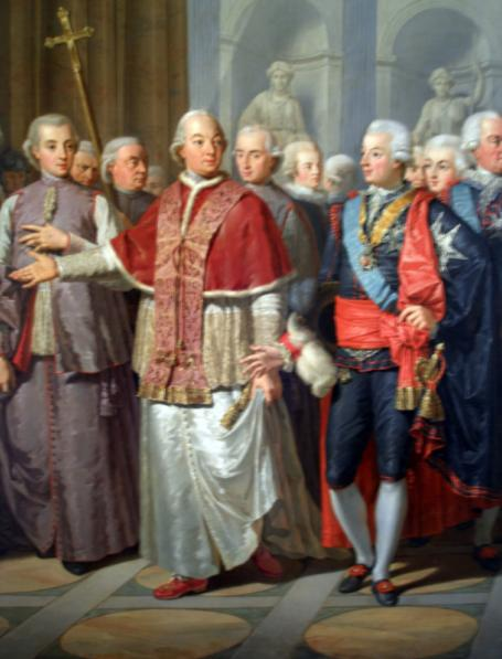 Pope Pius VI and Gustav III